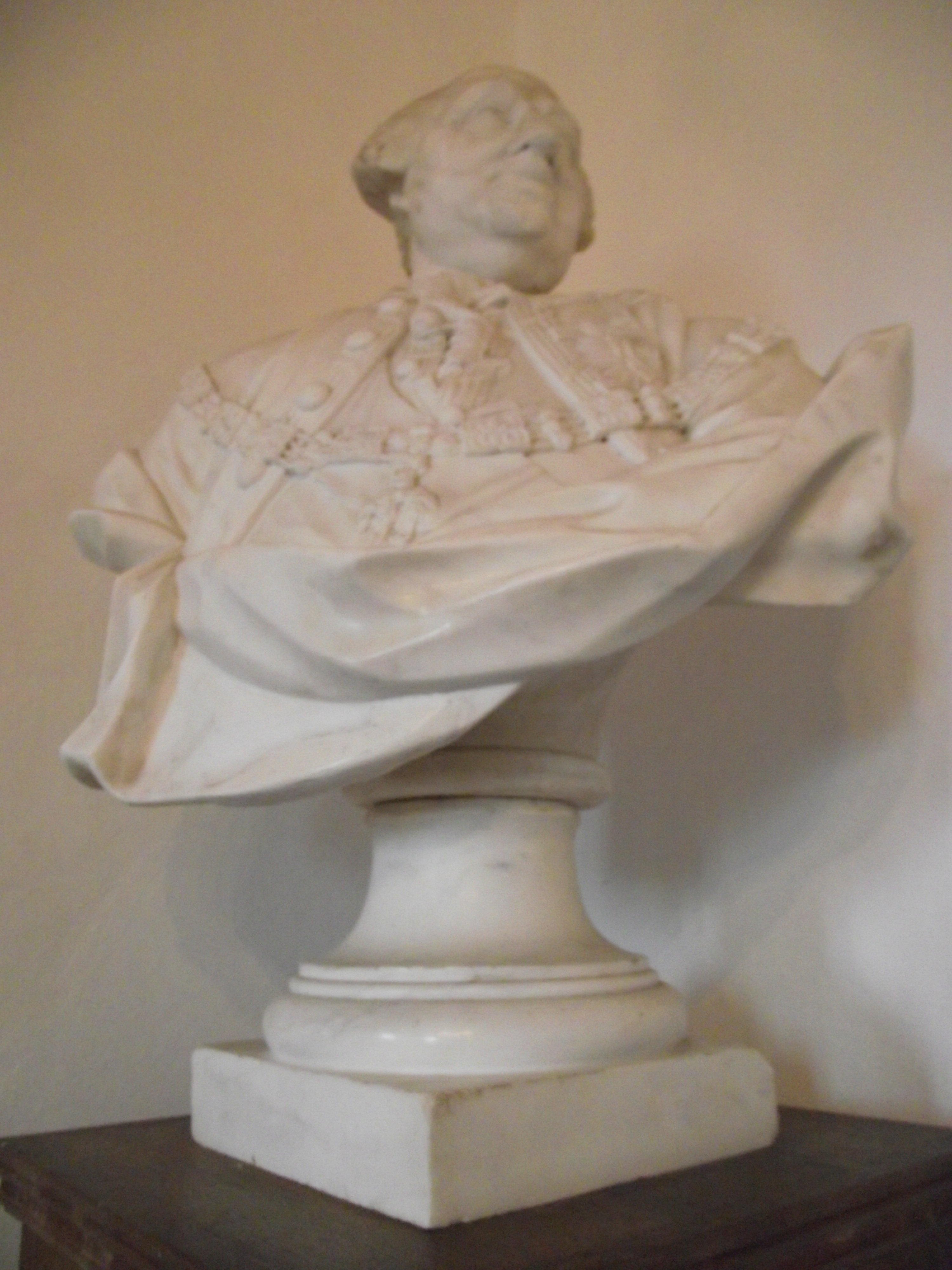 Predjama